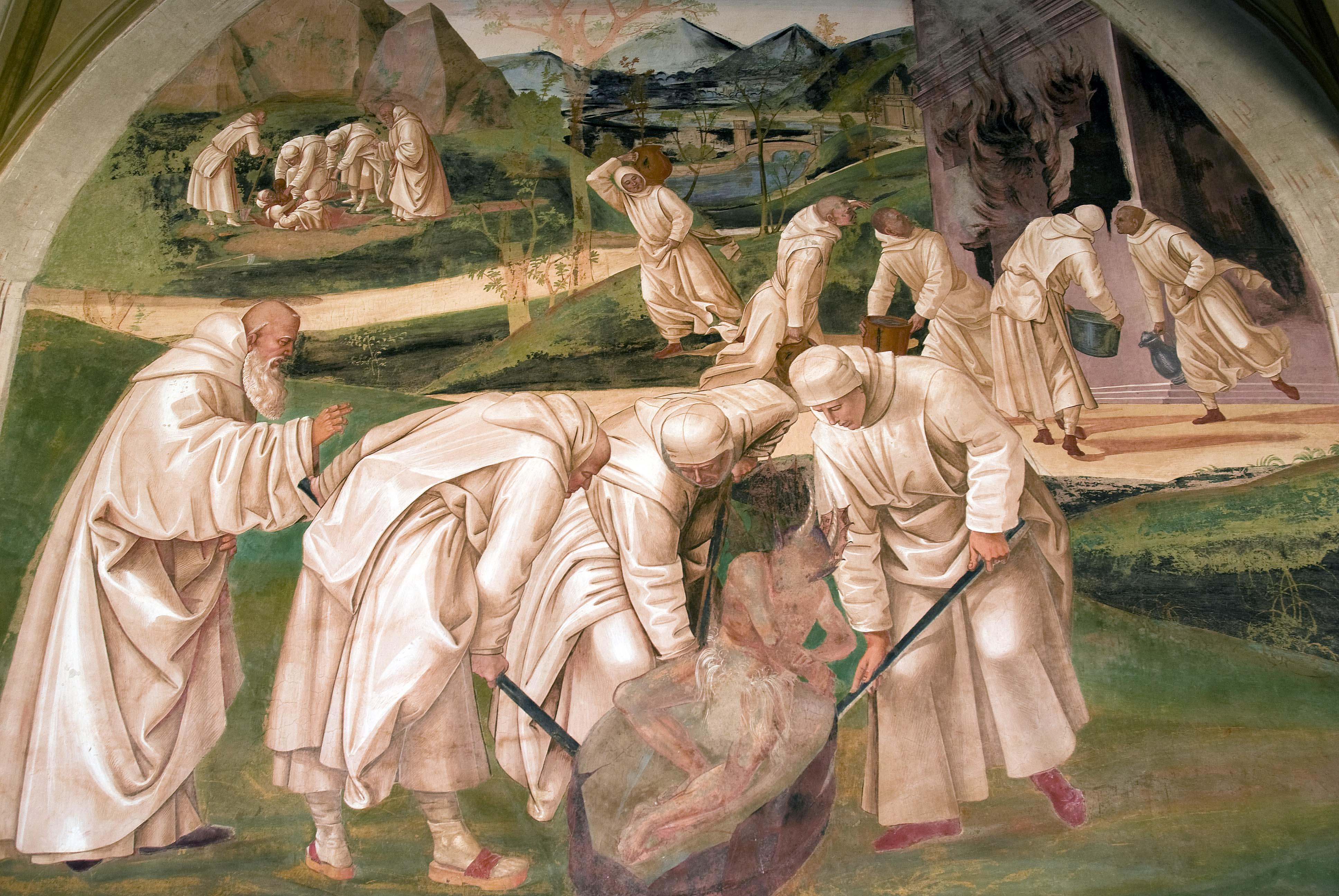 Come_benedetto_caccia_lo_nimico_di_sopra_alla_pietra